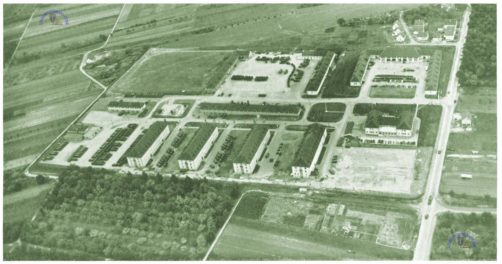 Krabbenloch-Kaserne